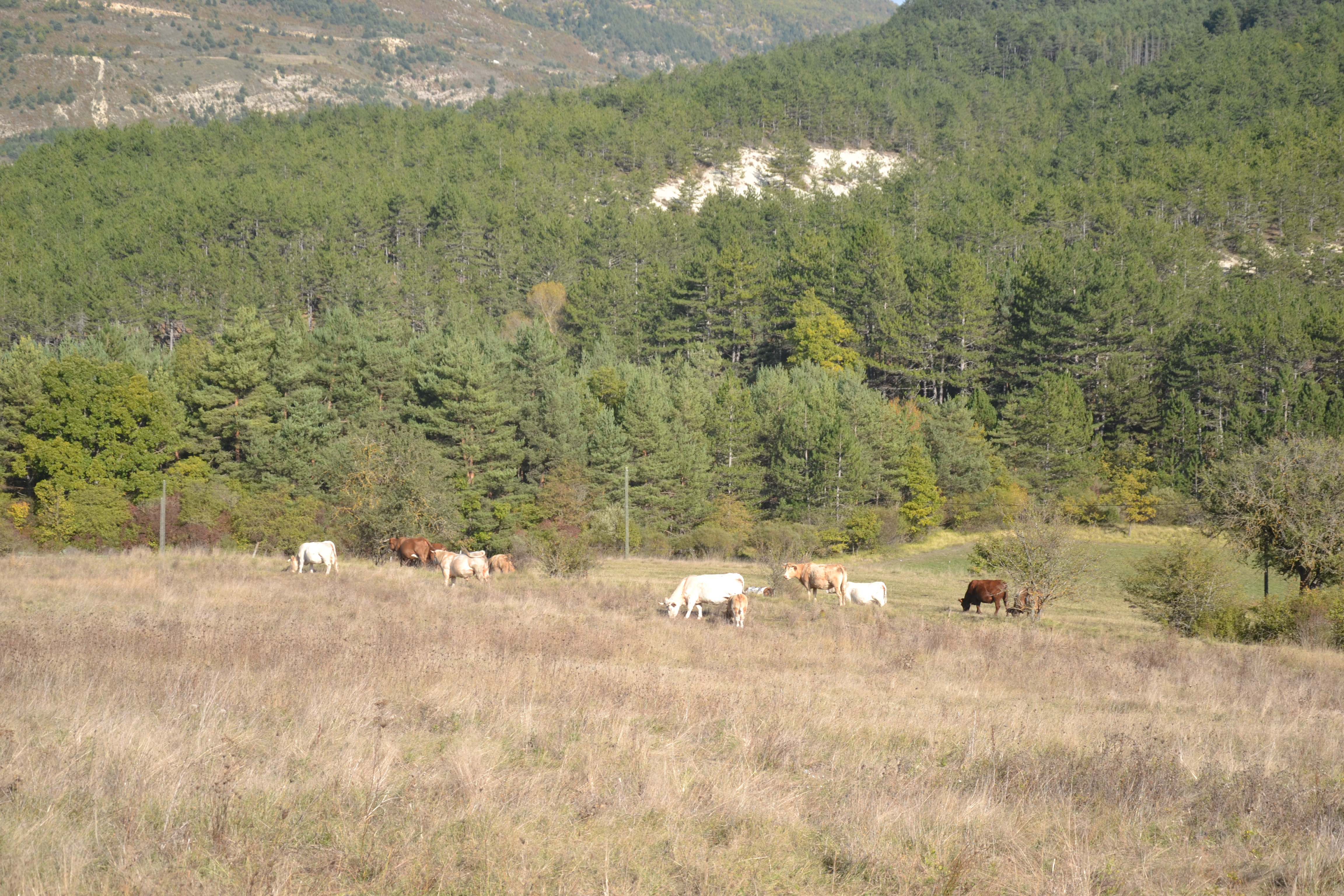 Vaches à Vers-sur-Méouges